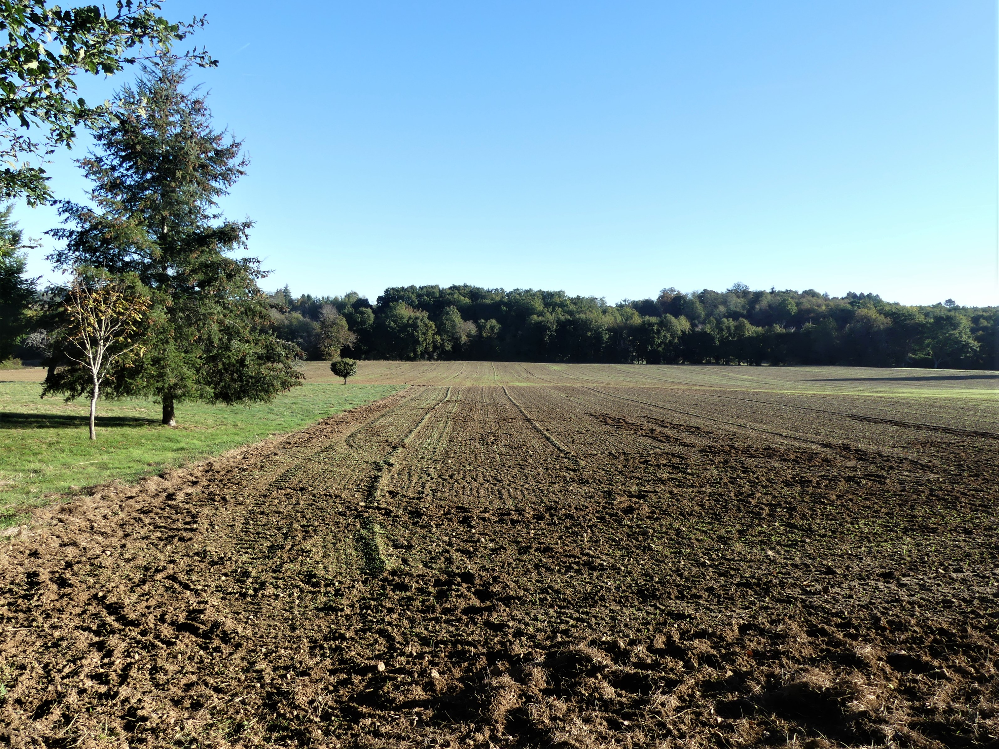 Paysage au lieu-dit Petit Caville, Saint-Jean-d'Eyraud, Dordogne, France.